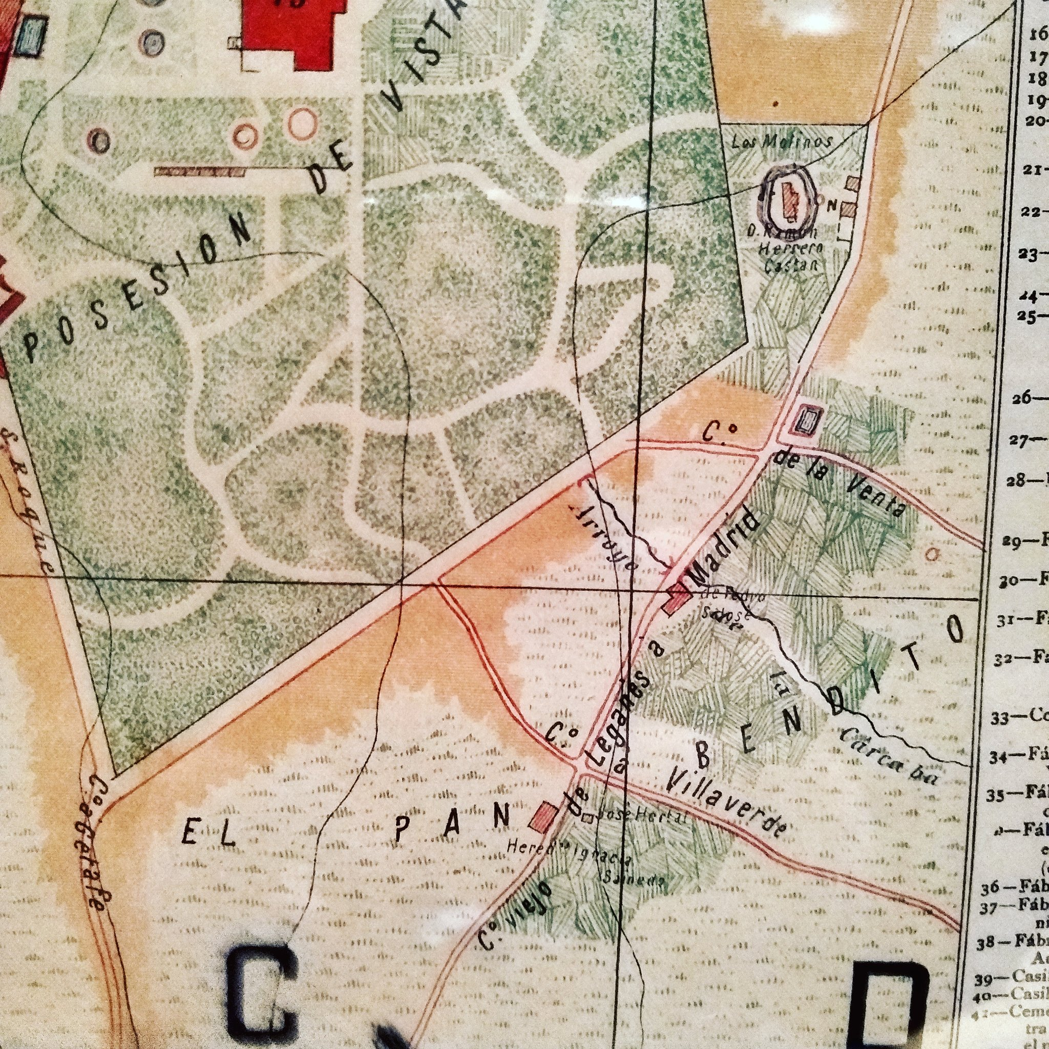 Mención al topónimo de Pan Bendito en un mapa de la ciudad de Madrid y aledaños de 1905 depositado y expuesto en el Museo de Historia de Madrid.